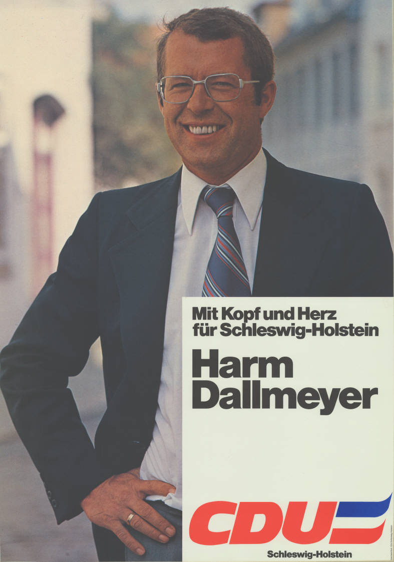 Mit Kopf und Herz für Schleswig-Holstein Harm Dallmeyer CDU Schleswig-Holstein Abbildung: Foto Plakatart: Kandidaten-/Personenplakat mit Porträt Auftraggeber: Verantw.: CDU Schleswig-Holstein Objekt-Signatur: 10-012 : 409 Bestand: Landtagswahlplakate Schleswig-Holstein (10-012) GliederungBestand10-18: Landtagswahlplakate Schleswig-Holstein (10-012) » Landtagswahl am 29.4.1979 » Kandidatenplakate Lizenz: KAS/ACDP 10-012 : 409 CC-BY-SA 3.0 DE